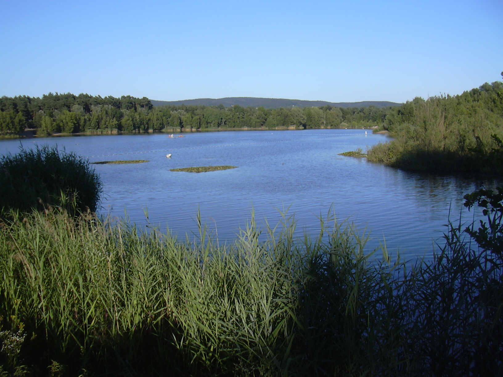 Großwelzheimer Badesee, near Aschaffenburg, Bavaria/Germany